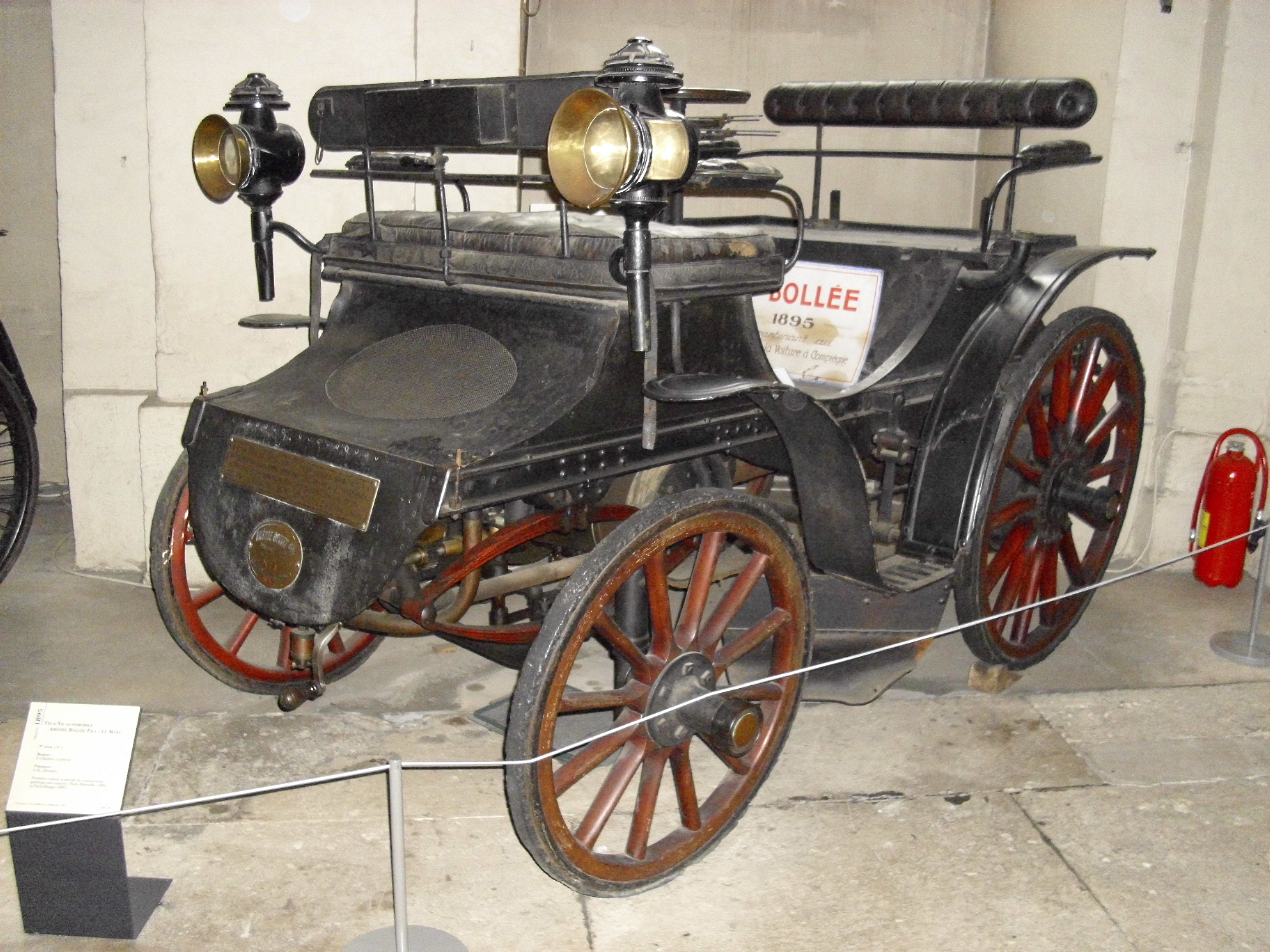 Amédée Bollée 6 CV 1895